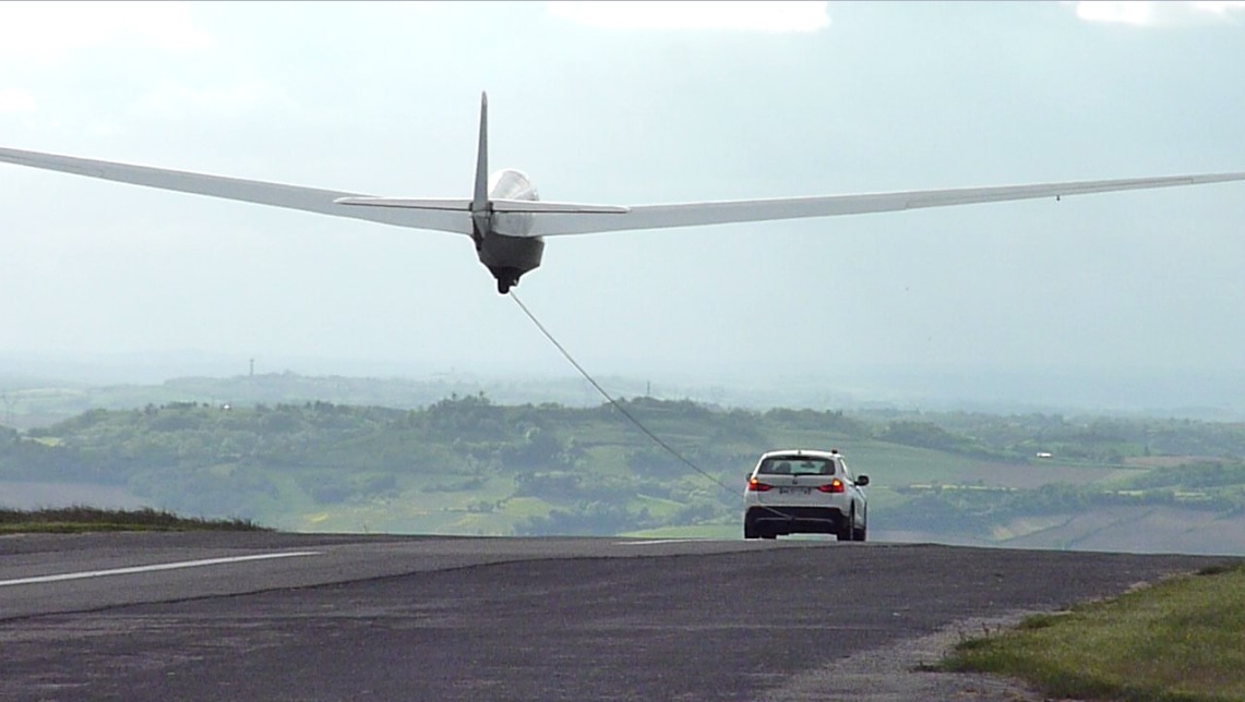 Décollage d'un planeur derrière une voiture. Photo prise sur l'aérodrome de la Montagne Noire en France.